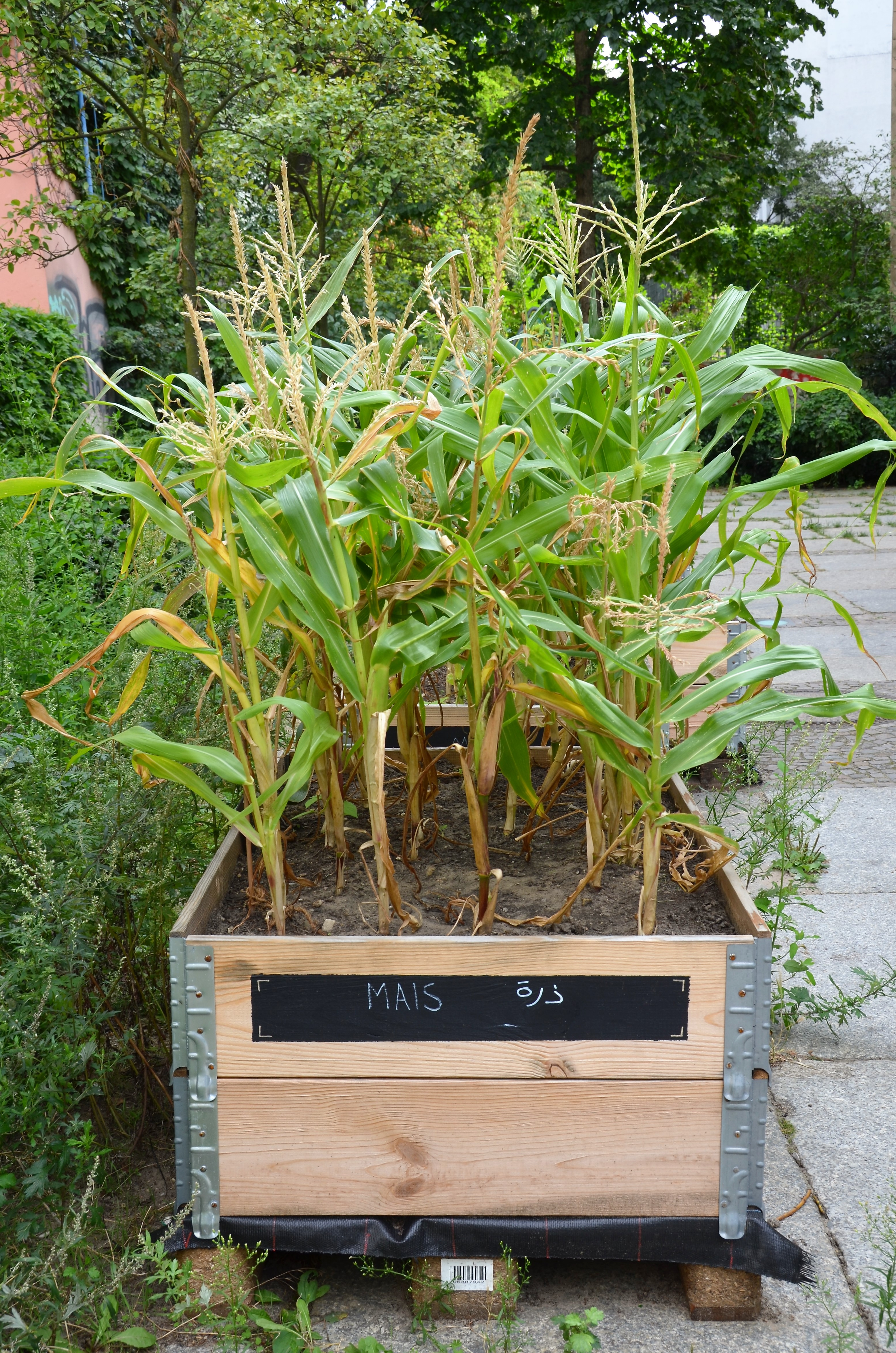 Urban gardening: Mais in Berlin-Schöneberg auf der Roten Insel im August 2016.